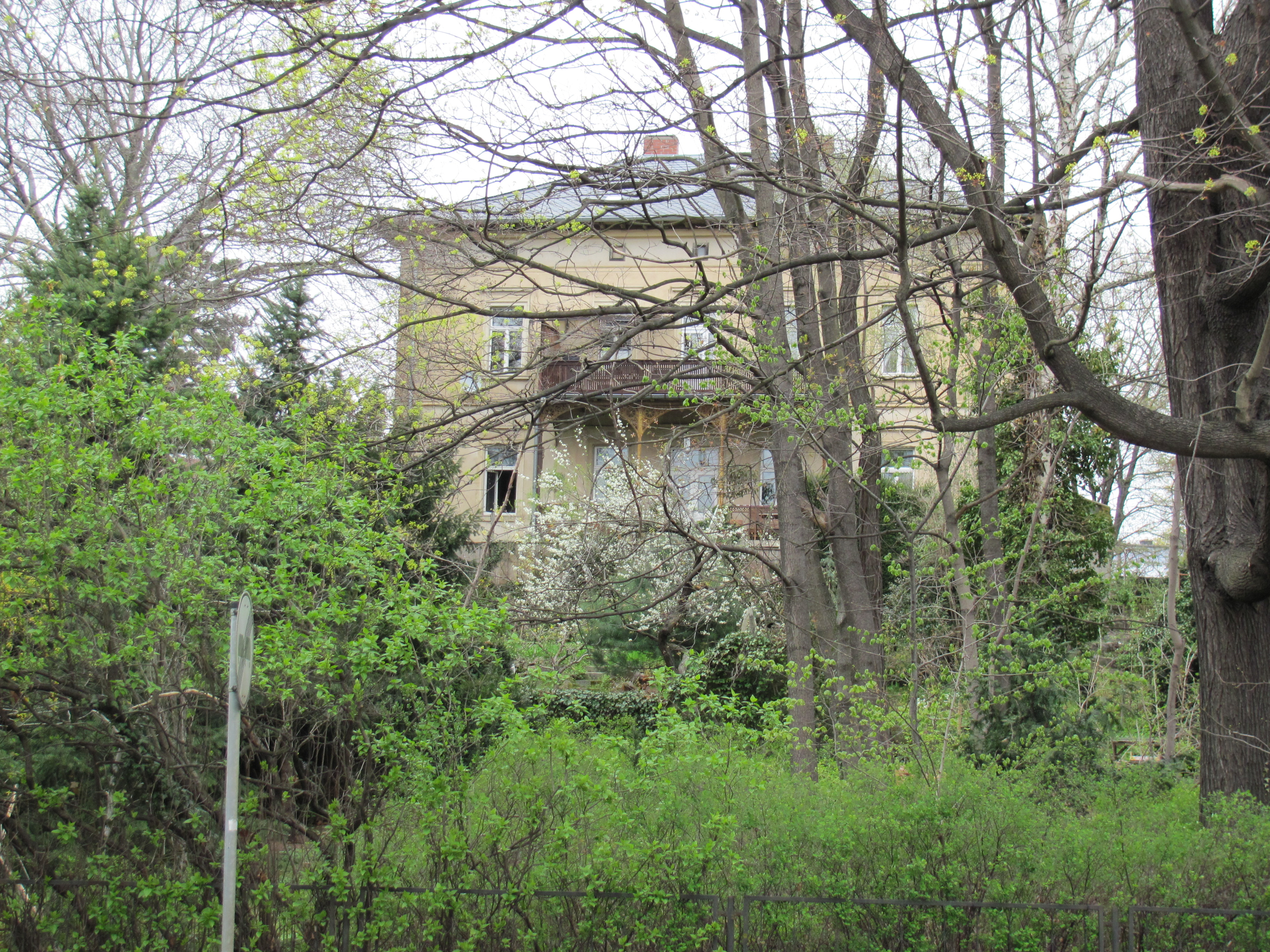 Radebeul Villa Meißner Straße 164